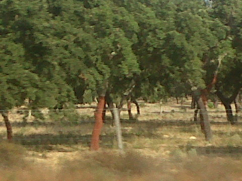 Chênes lièges exploités dans la région d'Alentejo (Portugal)